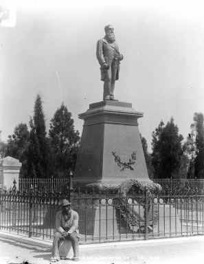 Sujet : Statue de Brand à Bloemfontein vers 1910. Photographie datée de plus de 70 ans